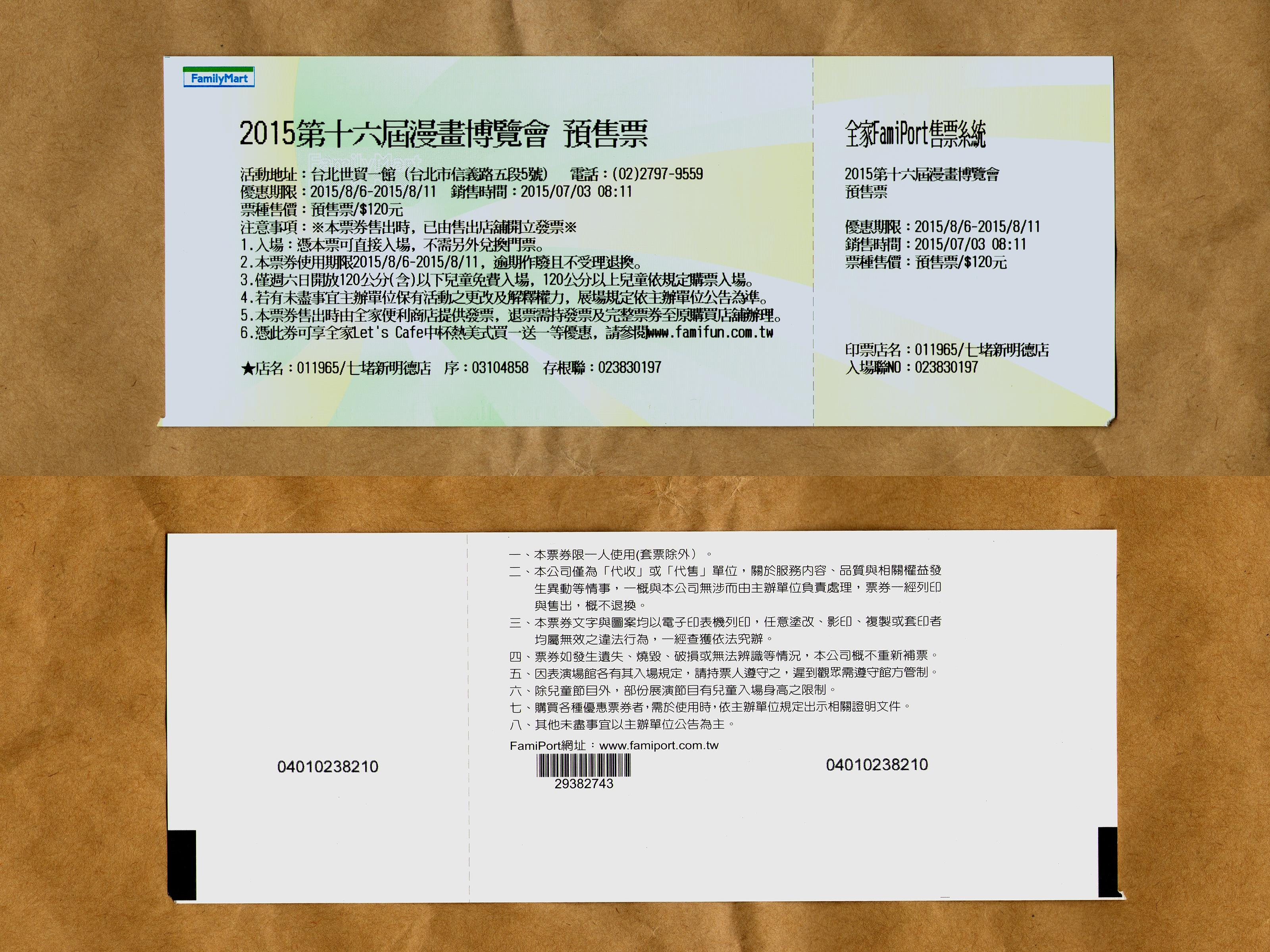 全家便利商店七堵新明德店售出的第16屆漫畫博覽會預售票正面（上）及背面（下）。